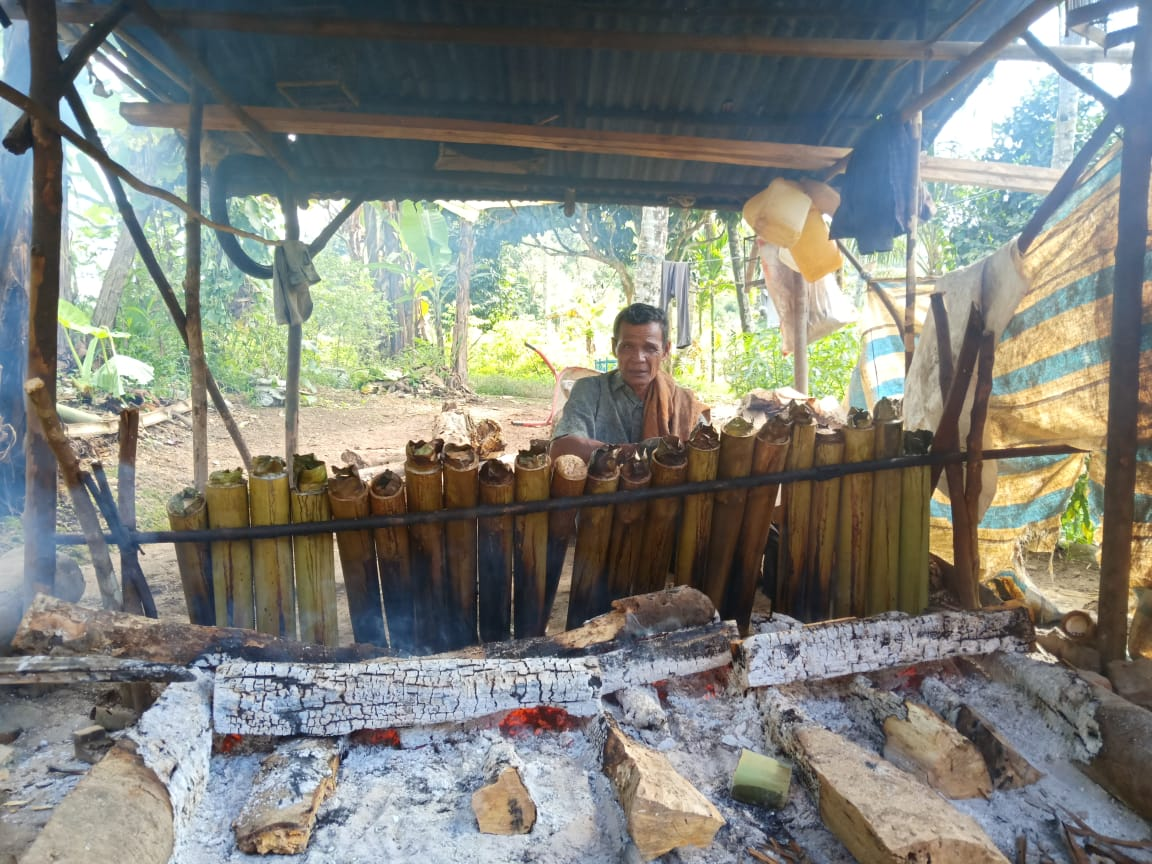 Tradisi Malamang atau memasak lamang di Lubuk Basung, Kabupaten Agam